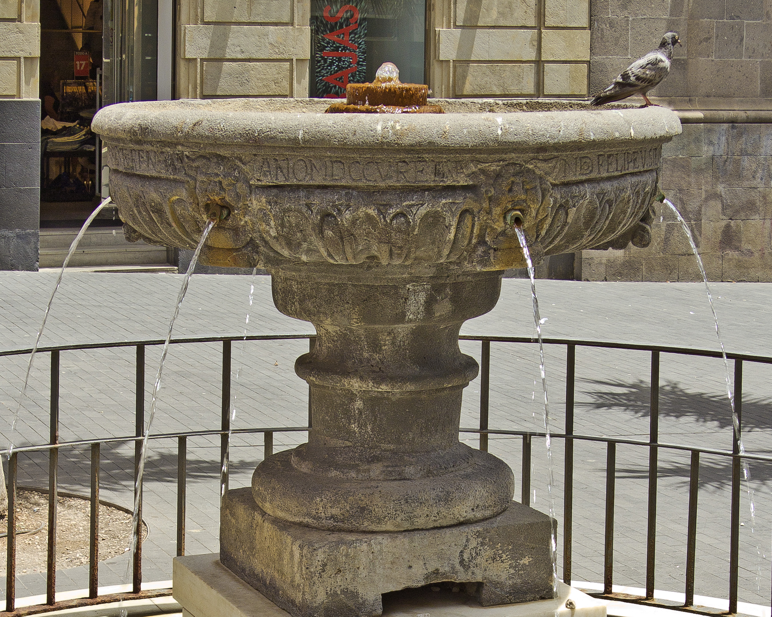 Der Brunnen auf der Plaza de la Candelaria in Santa Cruz de Tenerife ist aus örtlichem Vulkanstein hergestellt. Er ist Teil einer früher größeren Anlage zur Trinkwasserversorgung aus dem Jahr 1706.